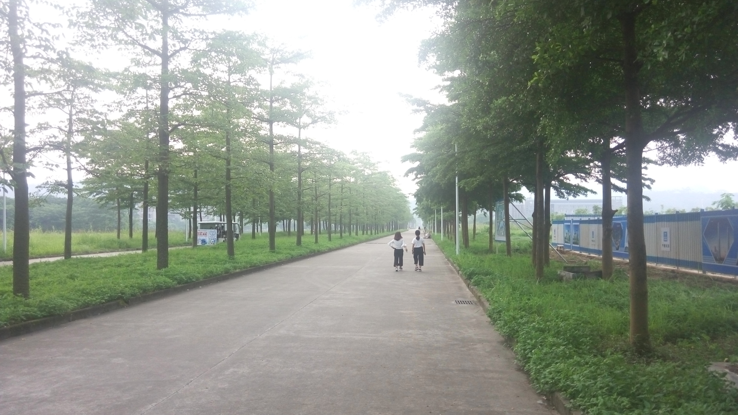 中文（中国大陆）: 广东南华工商职业学院博雅大道